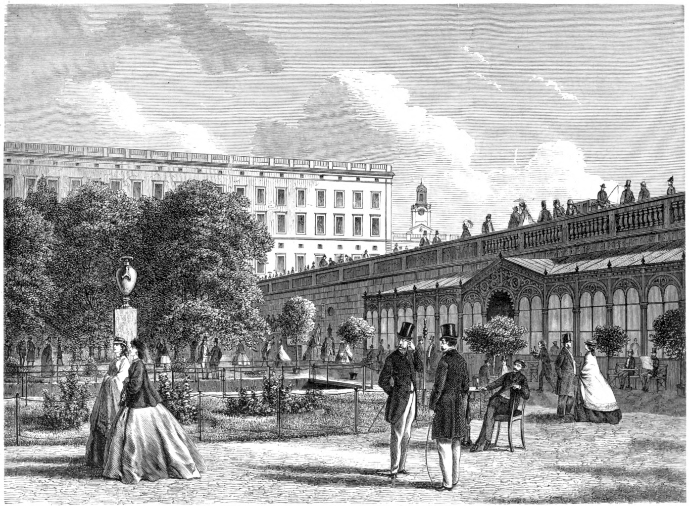 Strömparterren, Stockholm